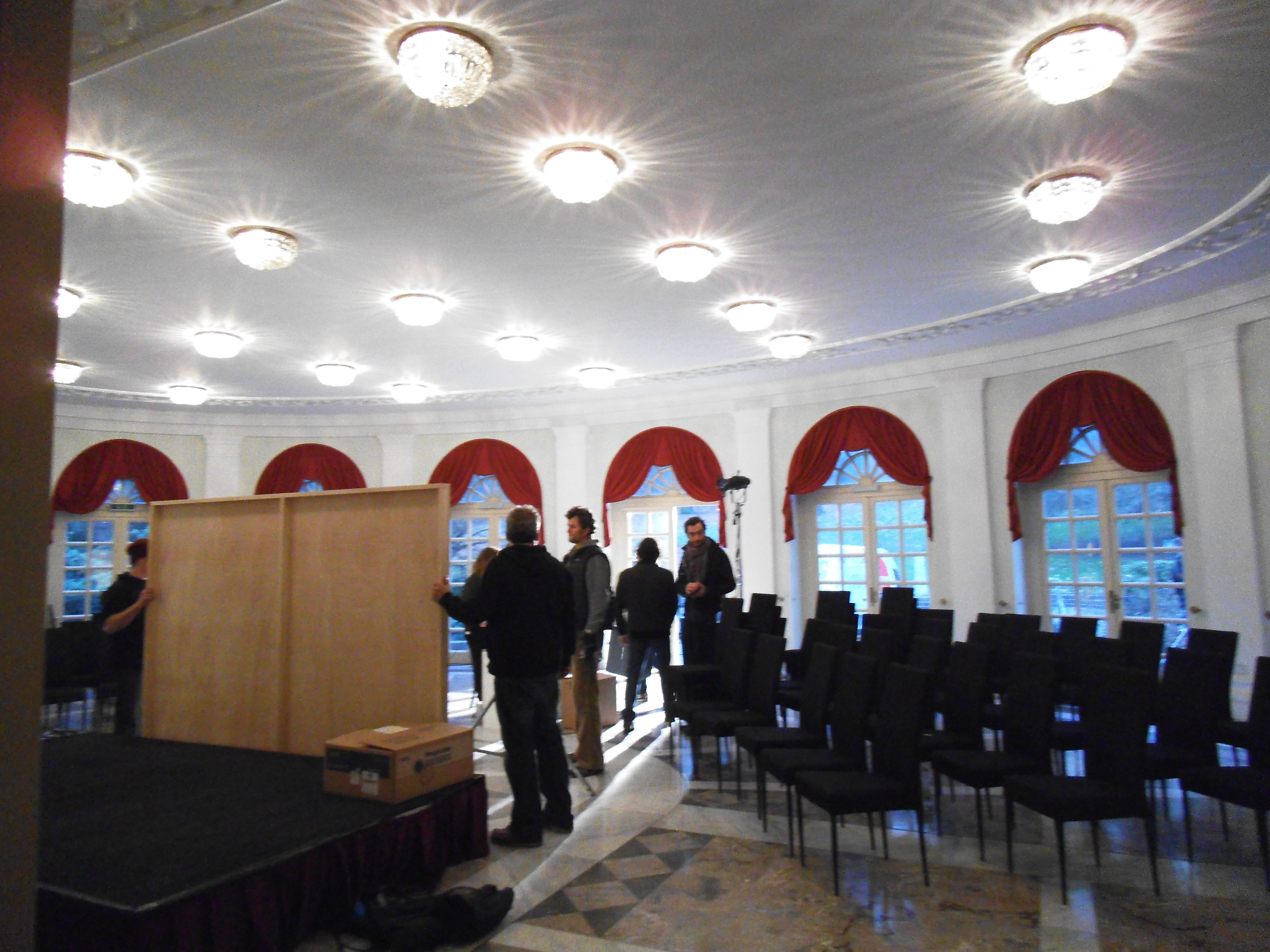 Seteinrichtung beim Film Auf das Leben! am 18. Dezember 2013 in der Redoute in Bad Godesberg.